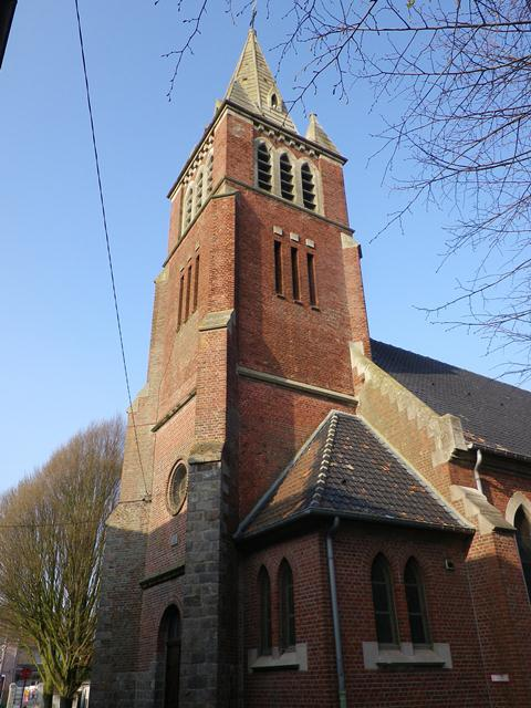 église de Brébières